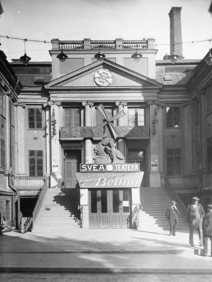 Sveateatern - Sveasalen på Hamngatan 18 den 30 september 1913. På programmet står det telepatiska fenomenet Ernest Bellini. I Sveasalen låg Stockholms fösta storbiograf Röda Kvarn. Teatern revs på hösten 1913 för att ge plats åt NKs varuhus. Bildnr: 2166-19